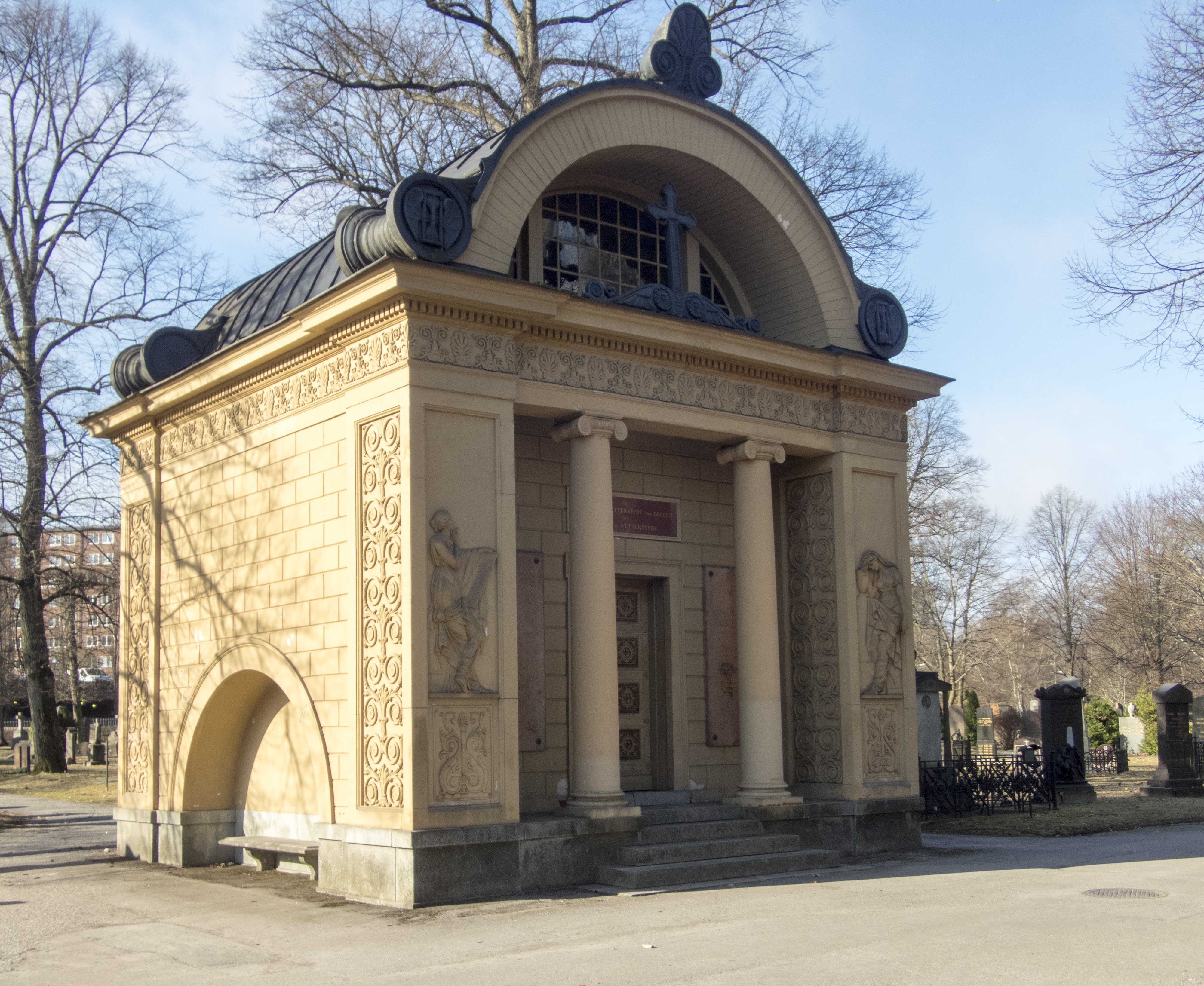 Wetterstedtska gravkoret på Norra begravningsplatsen. Uppfört 1835 till minnet av greve Gustaf af Wetterstedts avlidna maka Charlotta Aurora. Arkitekt Axel Nyström